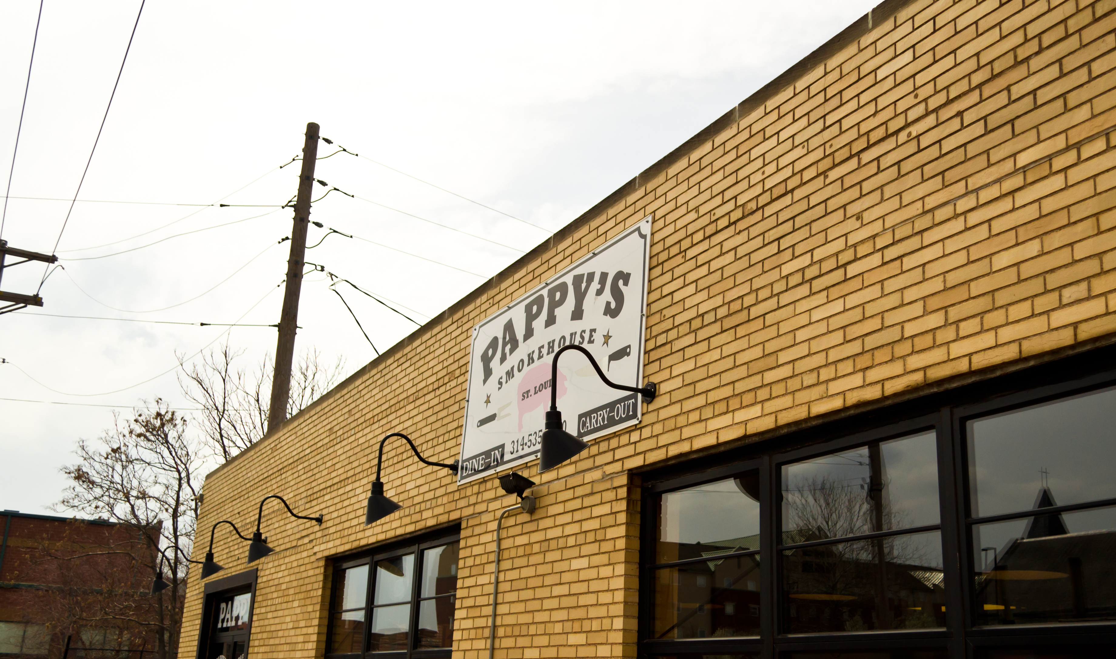 Pappy's Smokehouse, Saint Louis